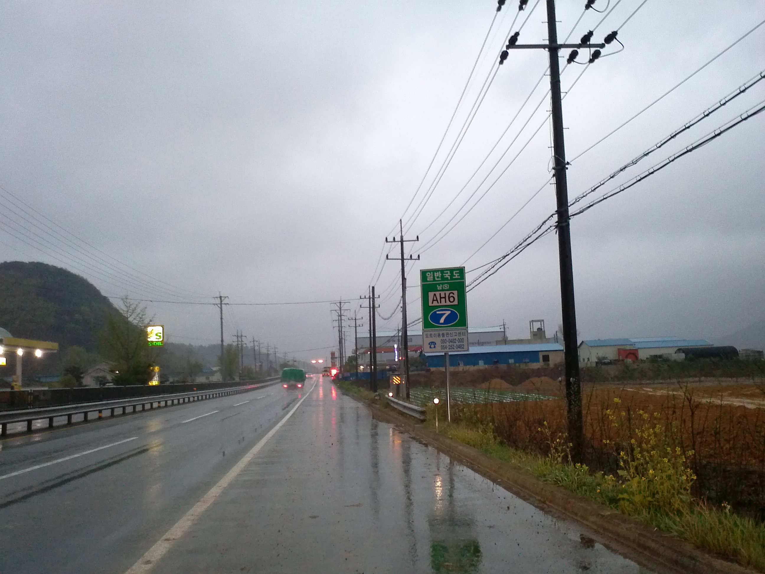 AH6, 7번국도 표지판